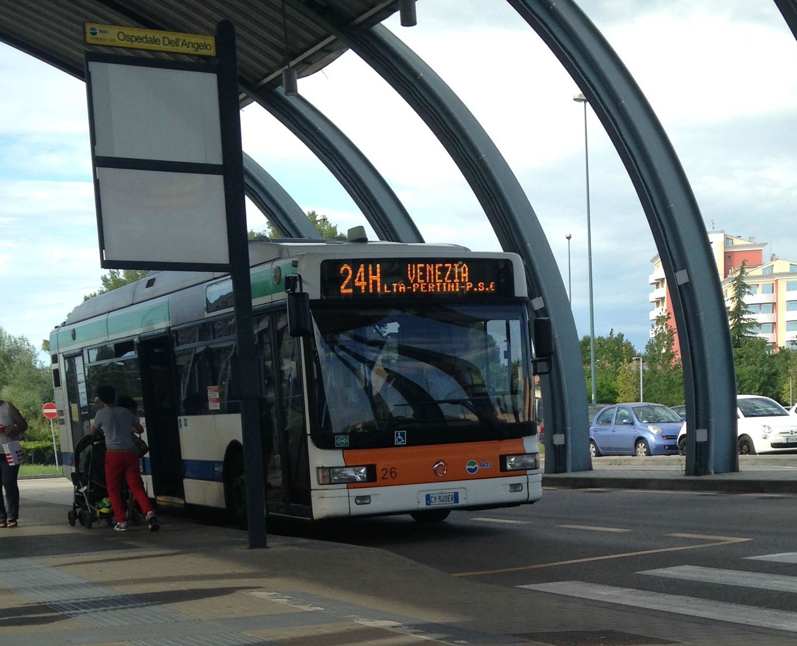 Autobus Irisbus Cityclass Cursor 12 CNG nr.26 di ACTV Venezia. Servizio urbano, Linea 24H, direzione: Venezia Piazzale Roma. Presso SFMR Ospedale.